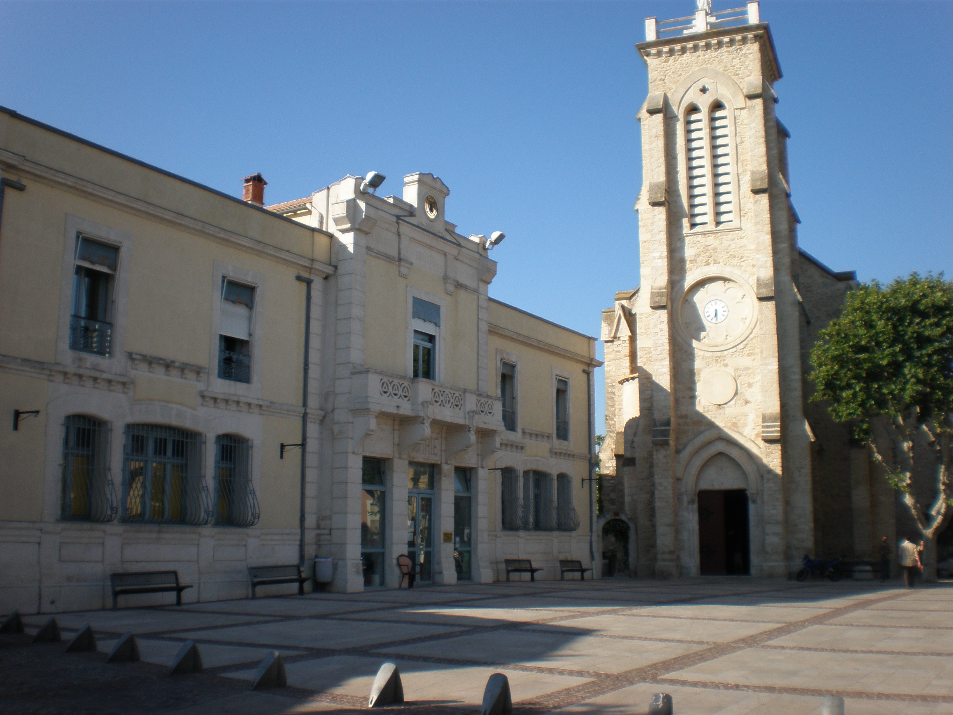 Pérols (Hérault) : la mairie et l'église de la Transfiguration-du-Seigneur et Saint-Sixte II